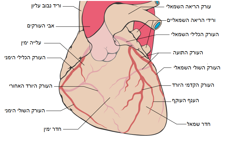 העורקים הכליליים